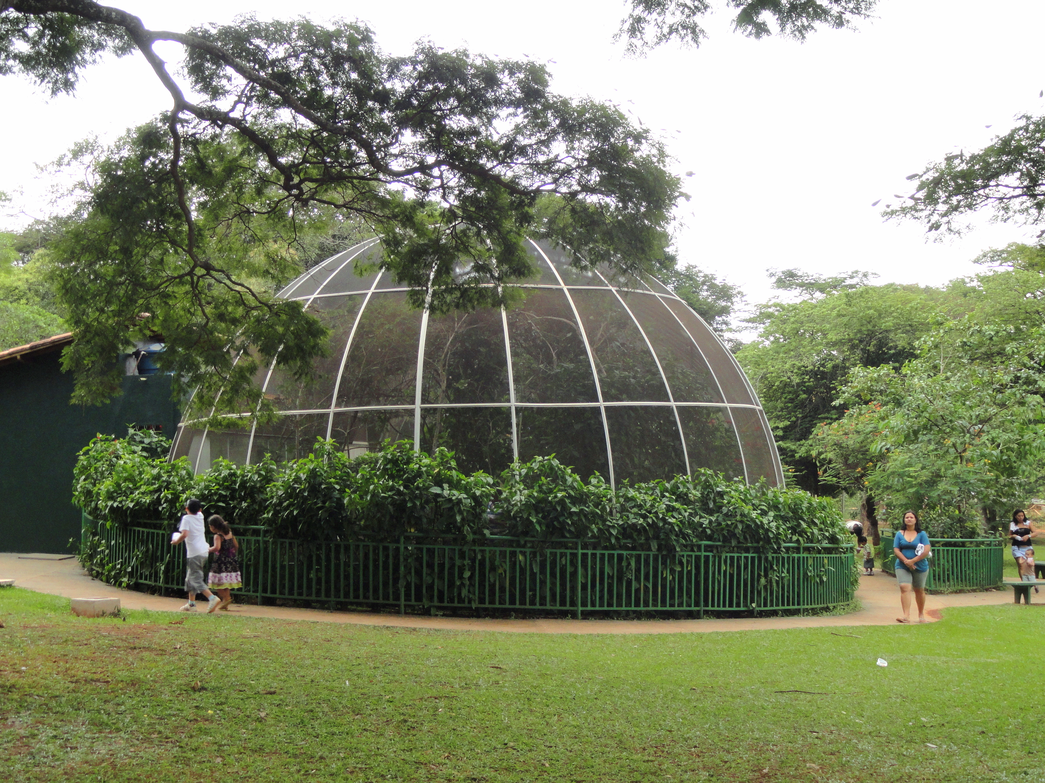 Jardim Zoológico de Brasília, Brasília, Brazil.